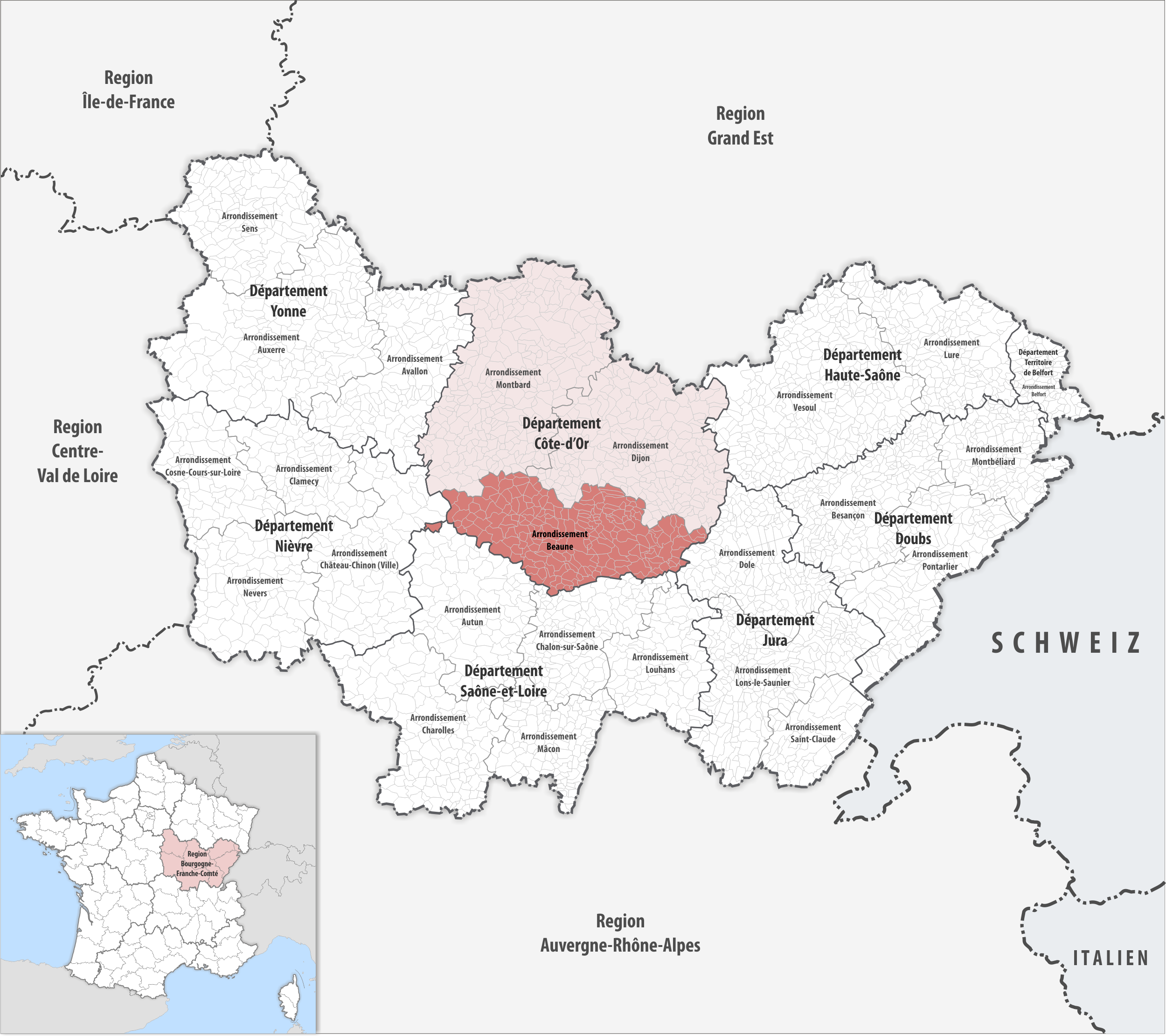 Lage des Arrondissements Beaune